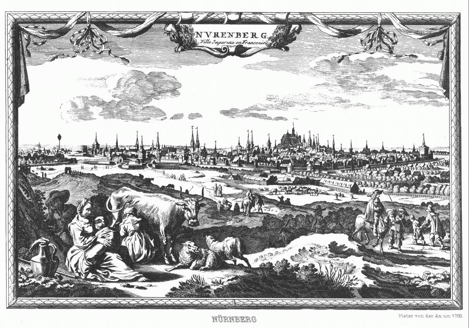 Nürnberg